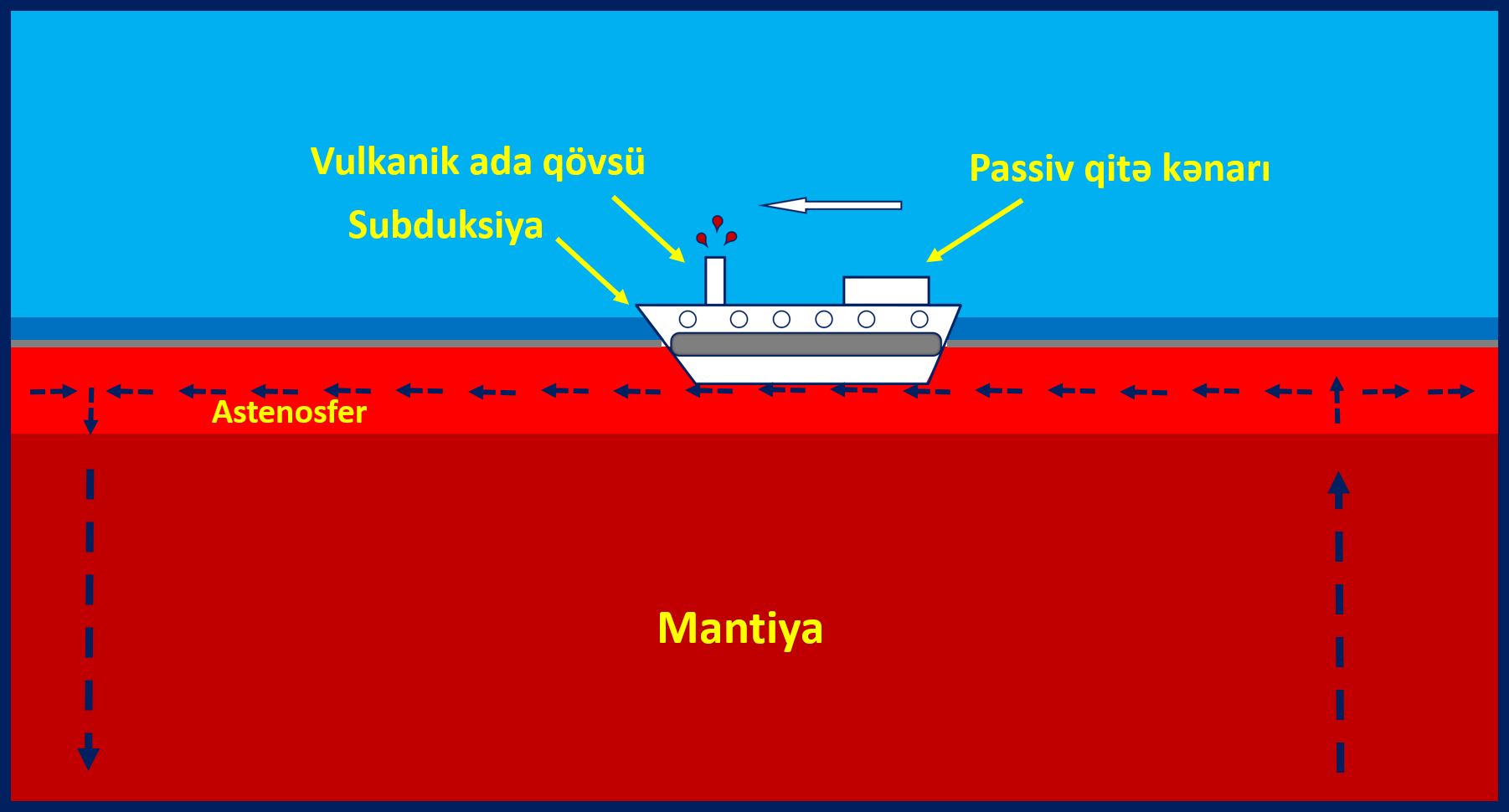 Subduksiya prosesinin gəminin hərəkətinə bənzədilməsi